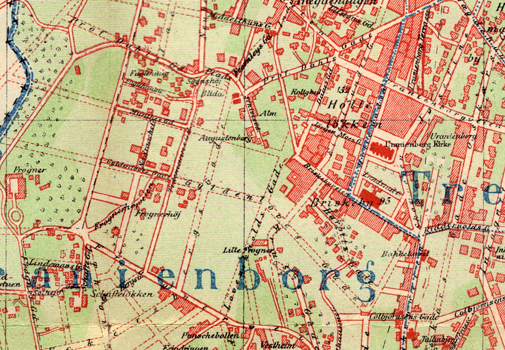 Uranienborg menighet, Oslo.